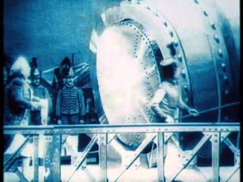 Disparo del cohete